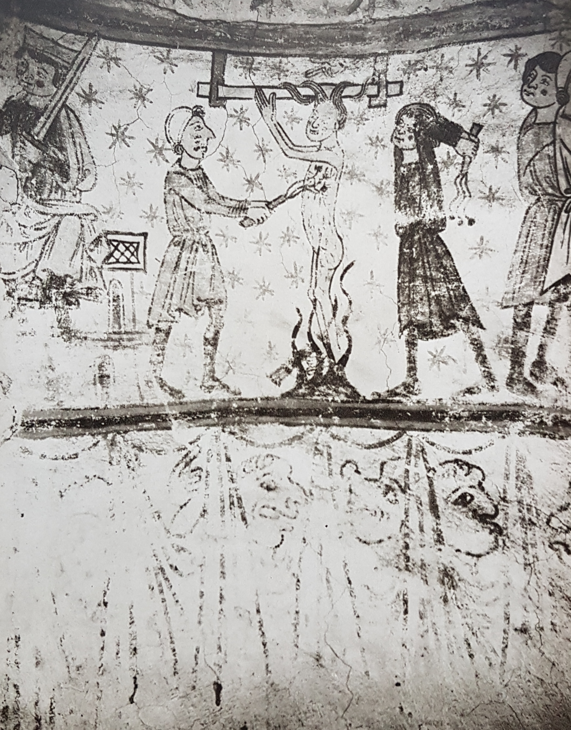 Väggmålnigen Margaretas mysterium i Hackås kyrka av Hackåsmästaren, avfotograferad bild från Allhems Svenskt konstnärslexikon.